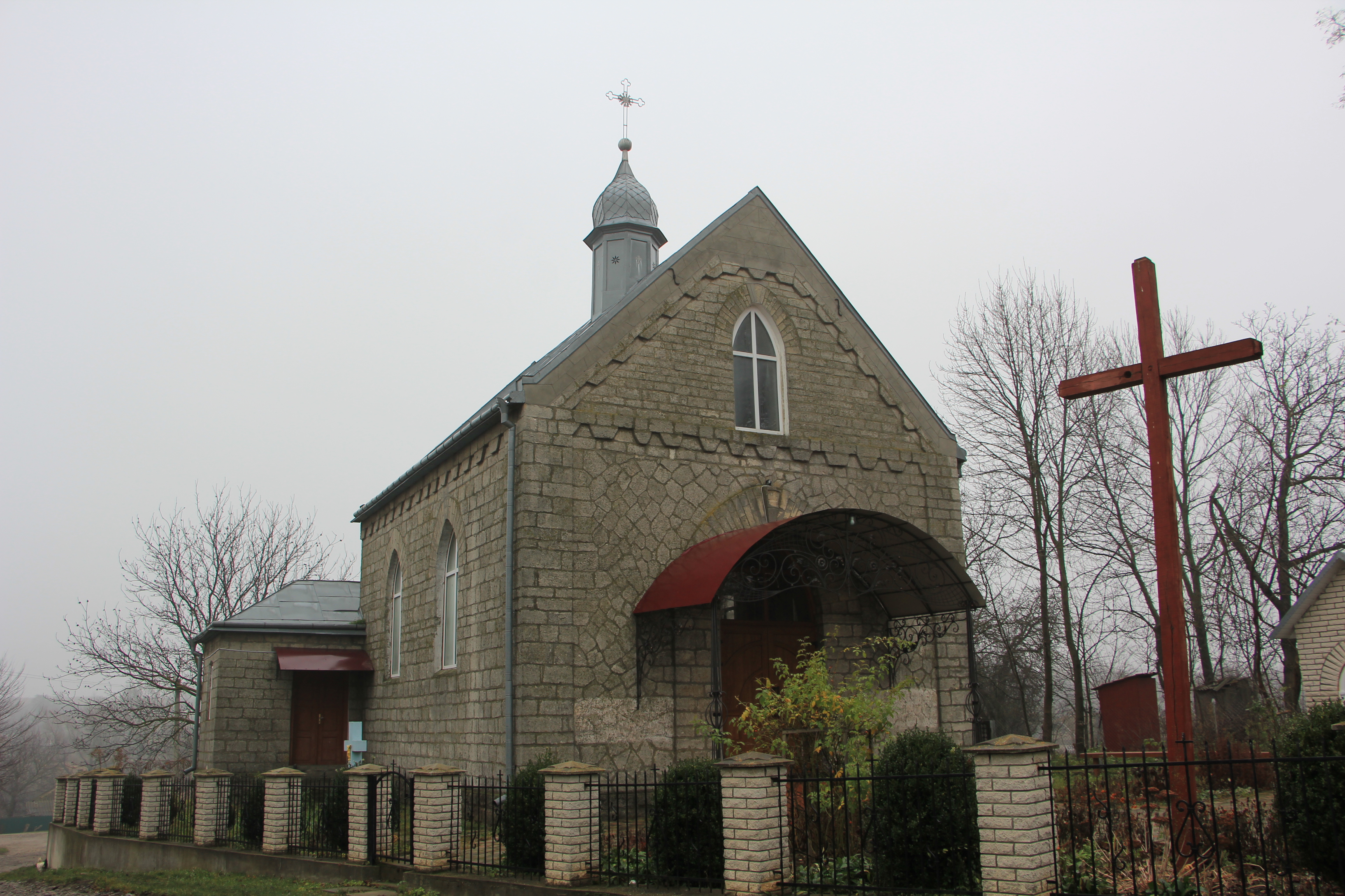 Церква УПЦ